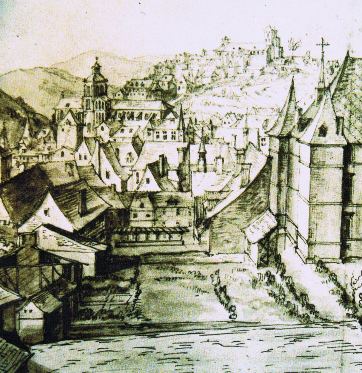 Les cathédrales Saint-Jean et Saint-Etienne de Besançon, en 1610.